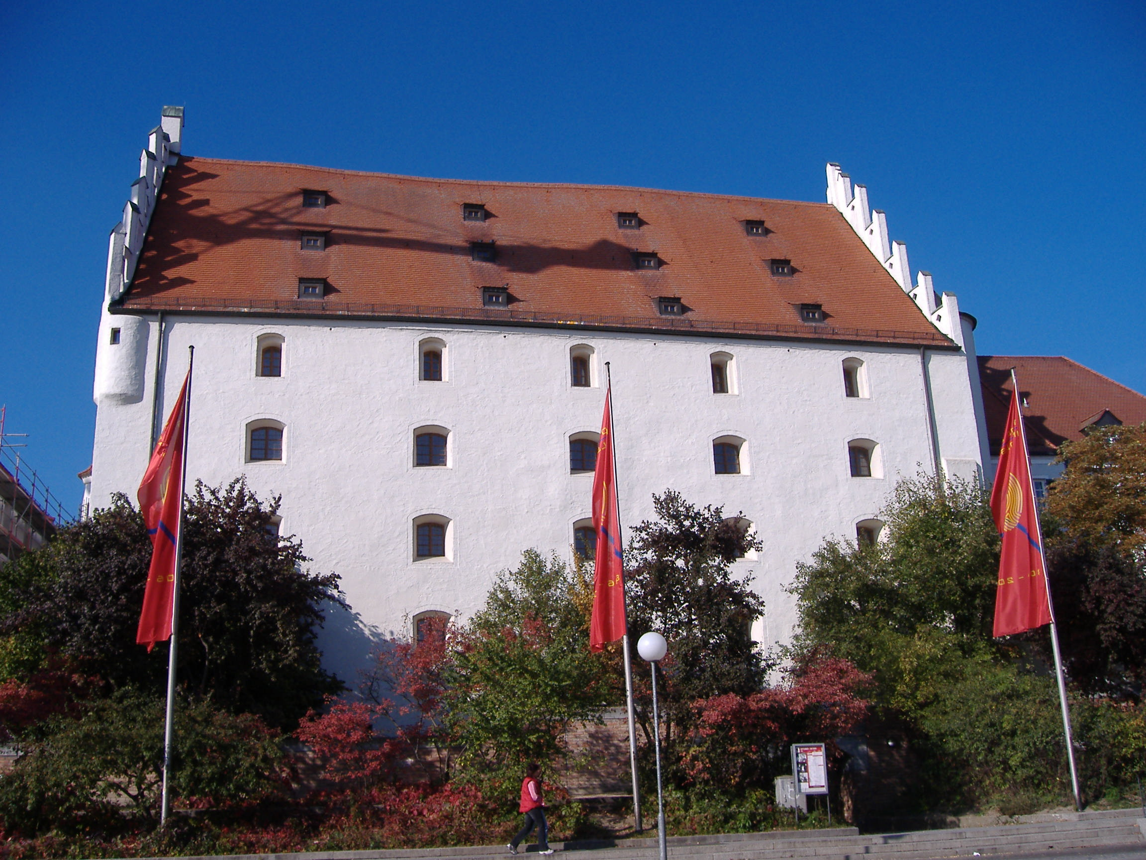 Sicht auf den Herzogskasten vom Viktualienmarkt aus.